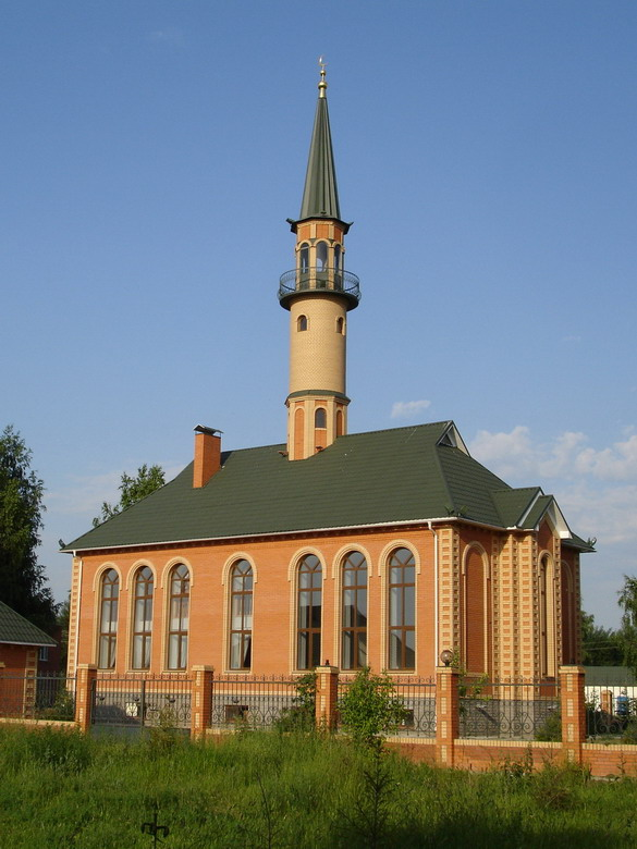 Мечеть Умет-Гульсум (тат. Өметгөлсем) в г. Нижнекамск, Татарстан, Россия